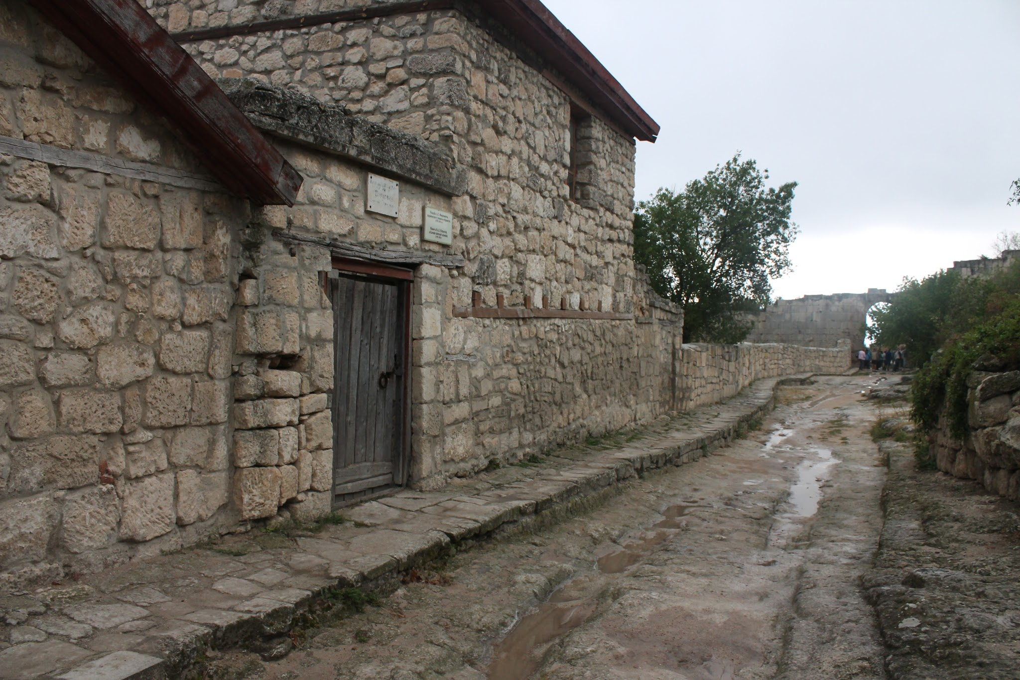 Печерні міста Чуфут-Кале, Бахчисарай, південно-східна околиця міста (колишнє Старосілля), на мисовому плато Столової гори (близько 540 м над рівнем моря)